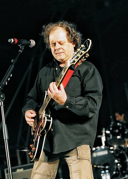 Guitarrista A. M. Ribeiro da banda UHF